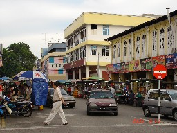 Author: Lim Thiam Poh Date: Sep 2006 Taken at Jalan Hj Abu